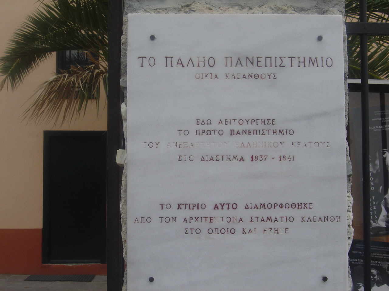 Label outside Kleanthis - Saubert hoyse in Plaka, Athens, Greece